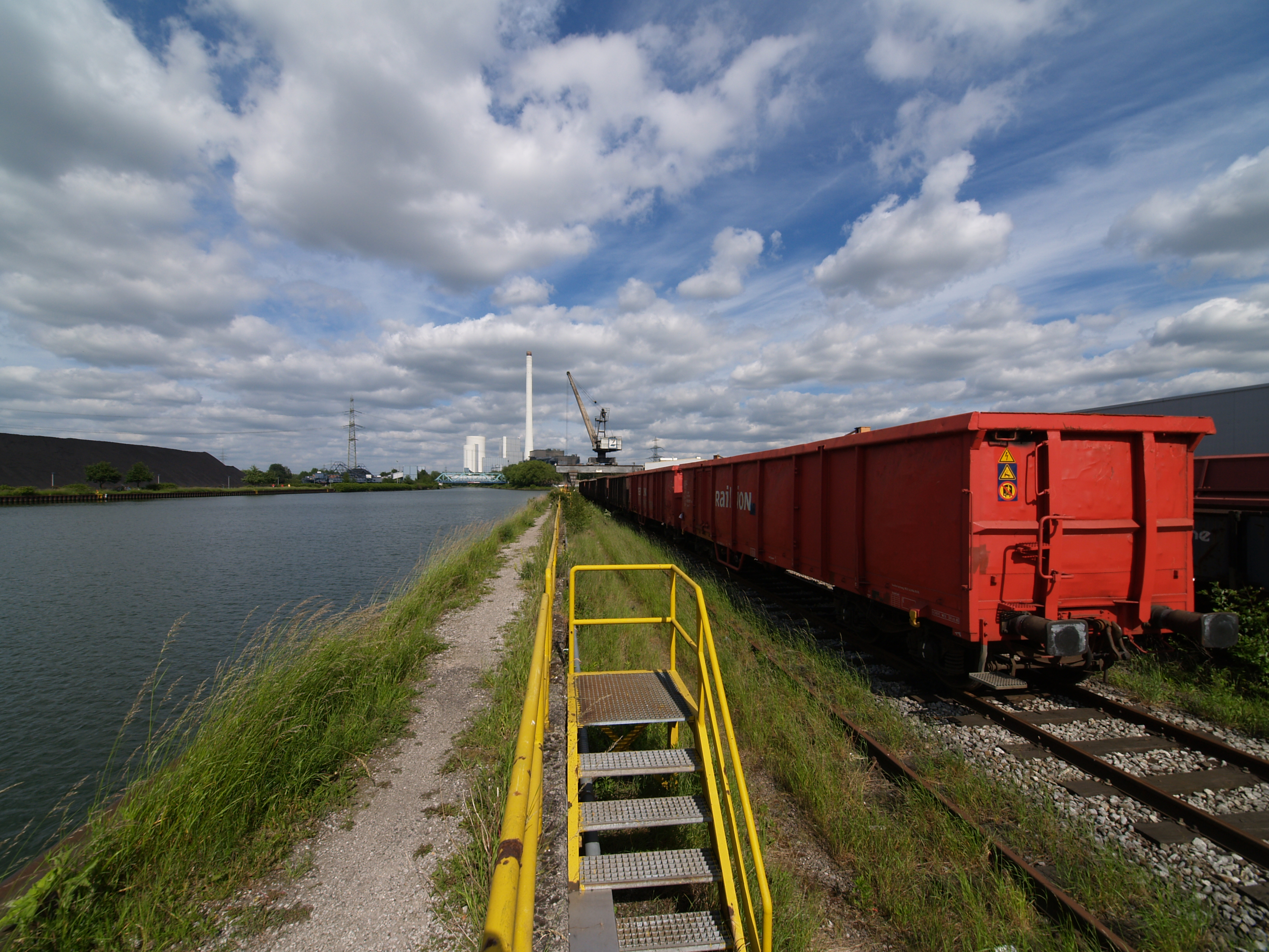 Der Wanner Osthafen am Rhein-Herne-Kanal in Herne